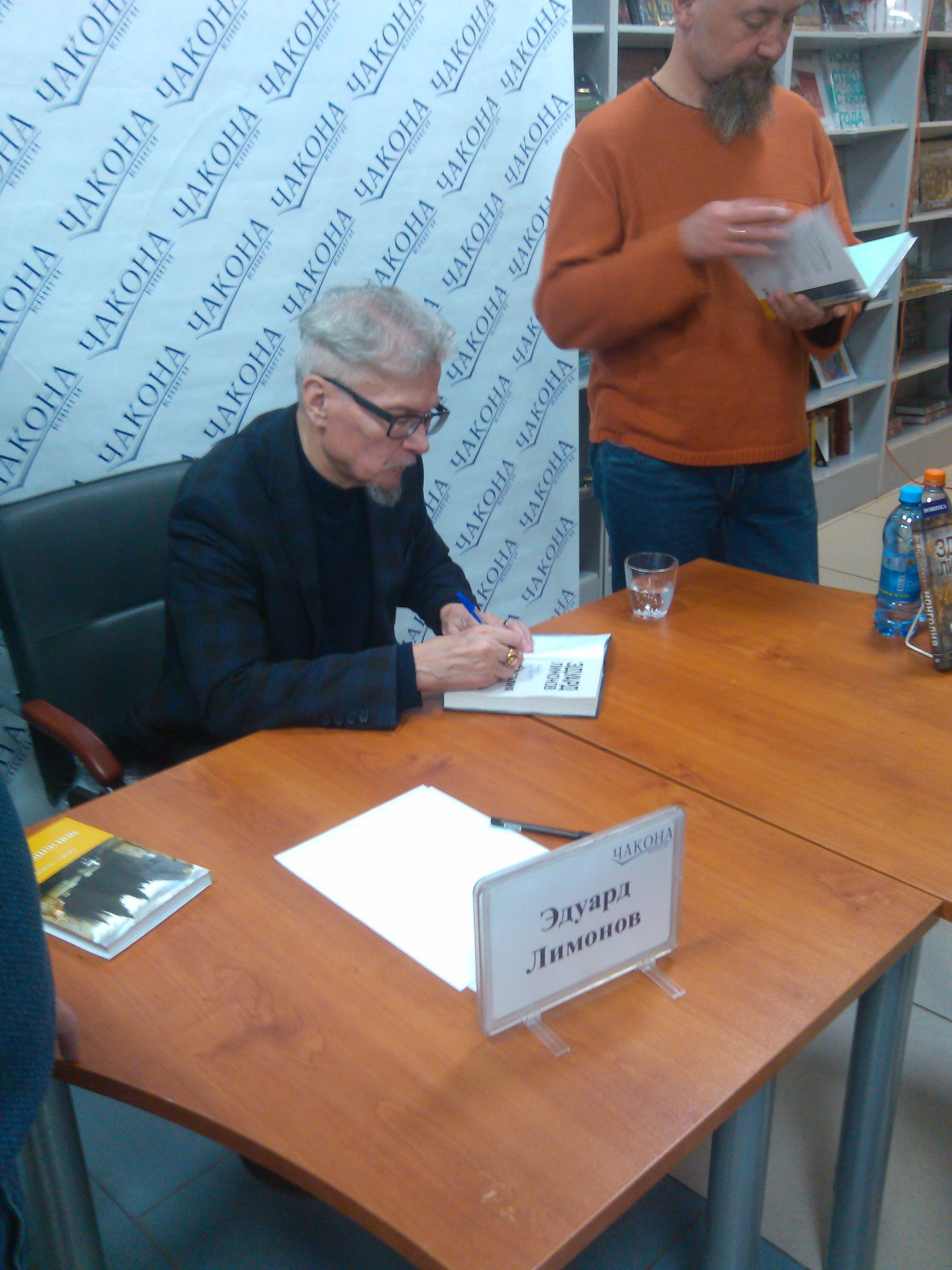 Эдуард Лимонов на презентации книги «Мои живописцы» в Самаре в магазине Чакона.